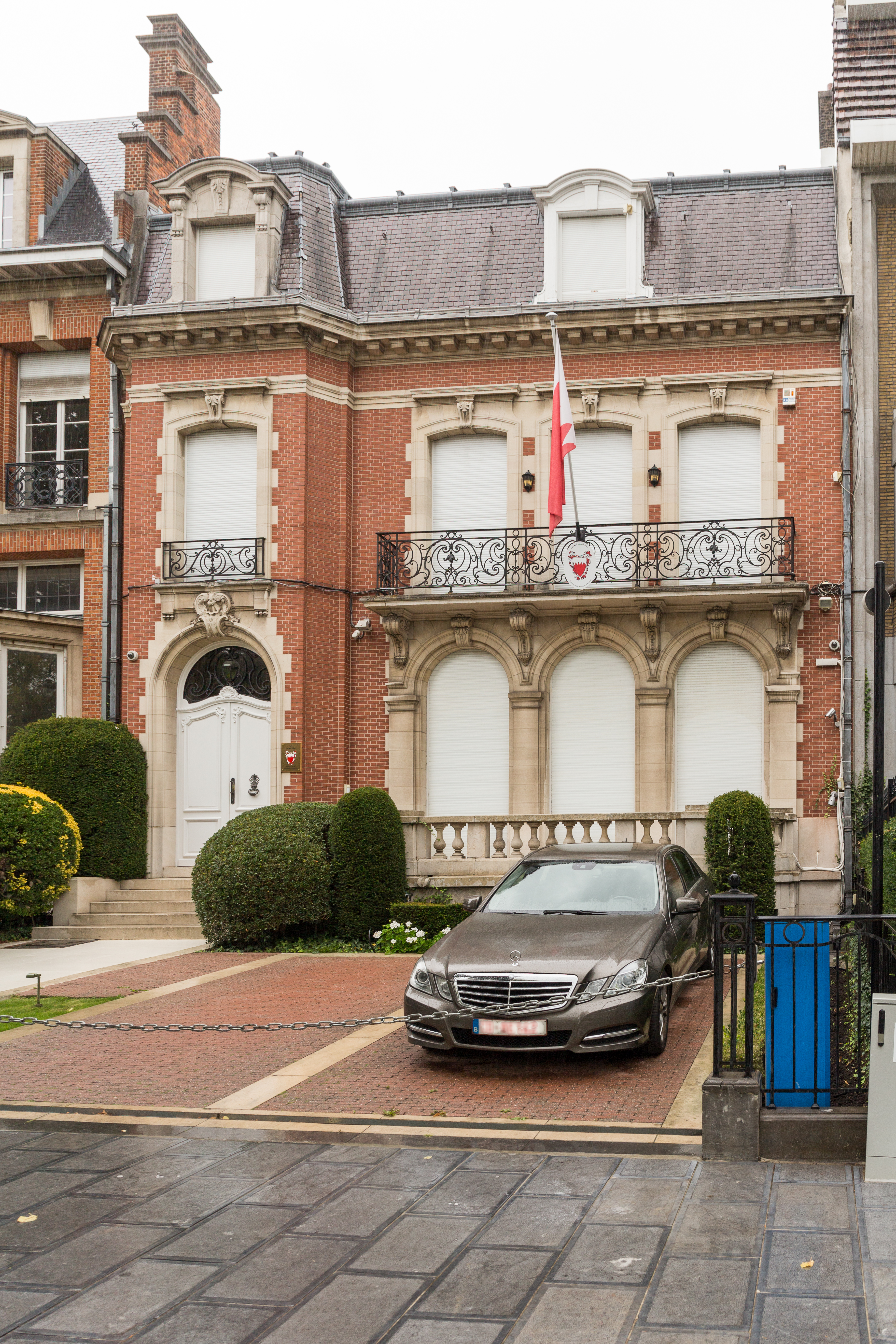 Ambassade de Bahreïn en Belgique, Avenue Franklin Roosevelt 102, Bruxelles.